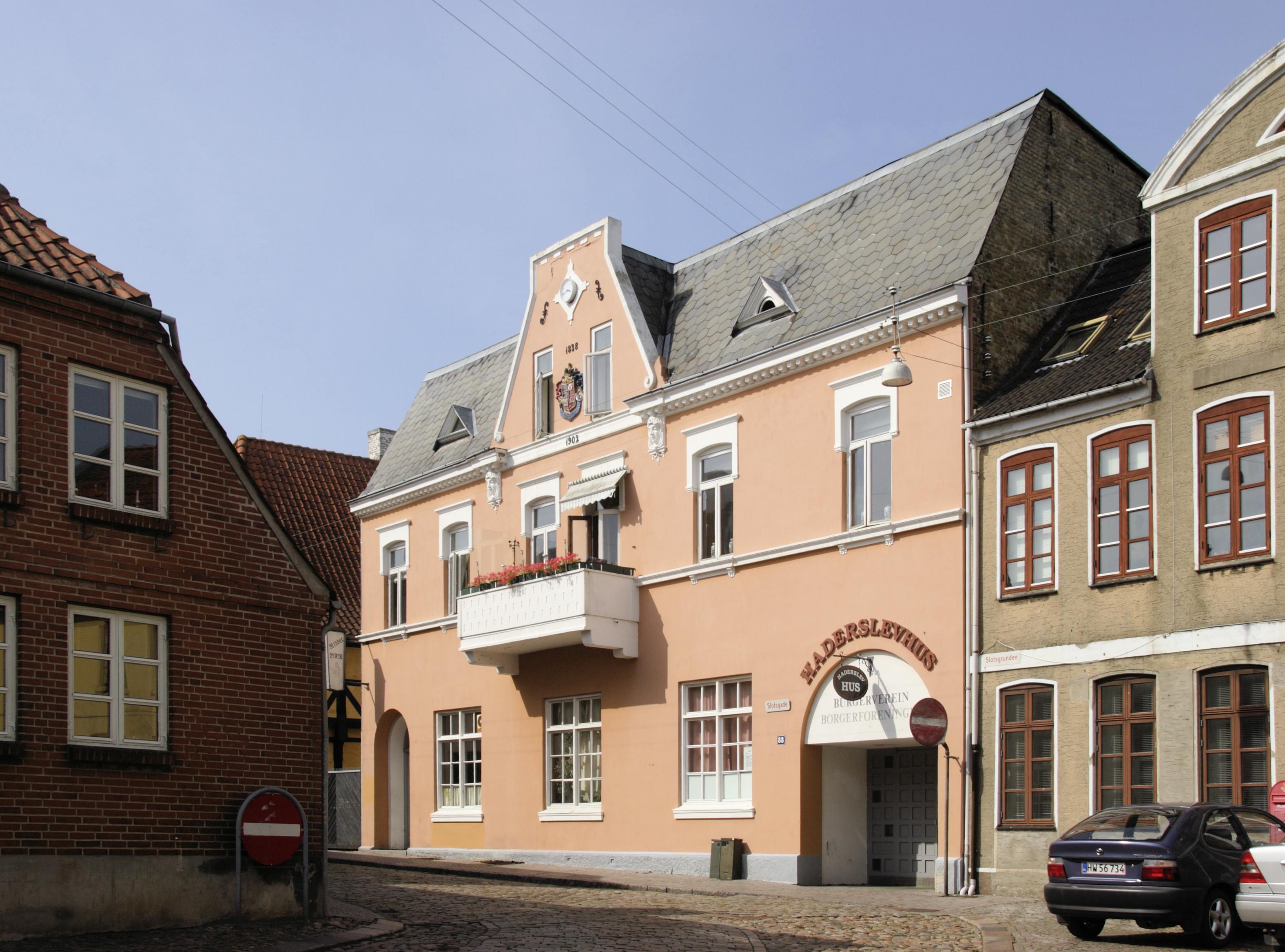 Haderslevhus sommeren 2012